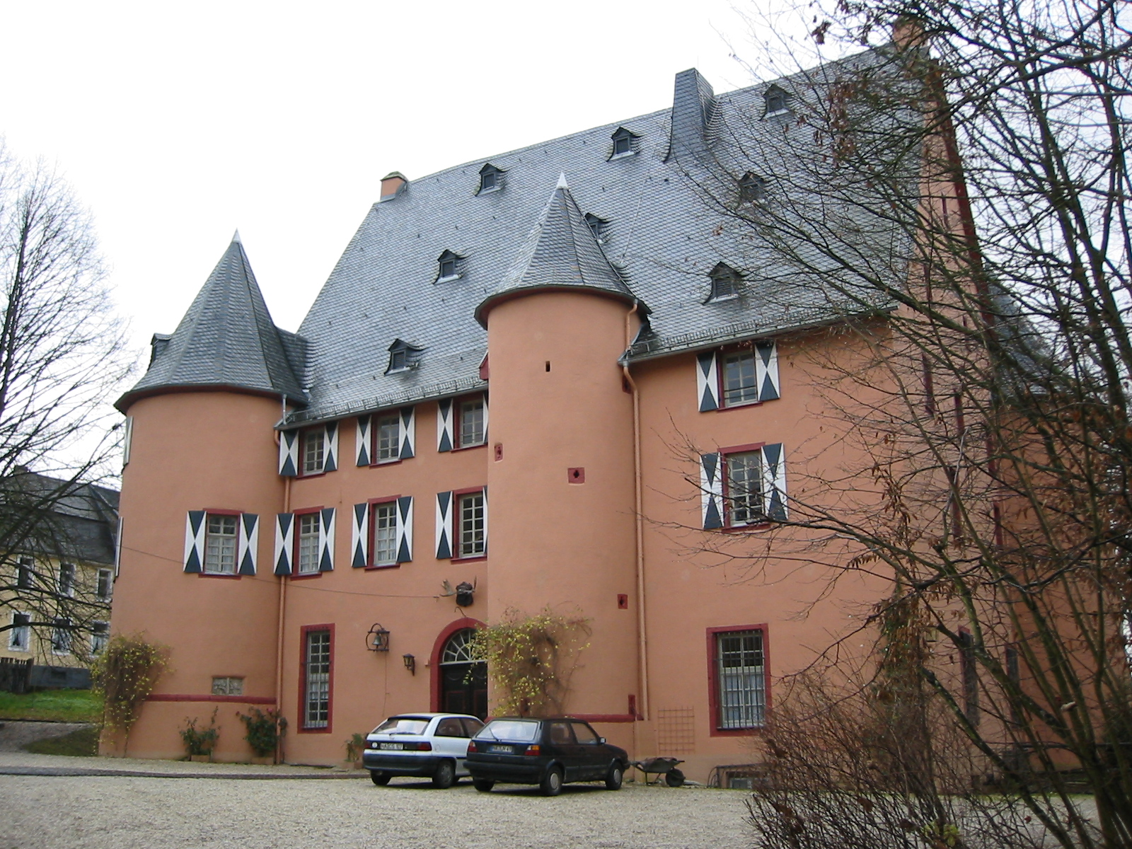 Frontansicht Burg Waldmannshausen